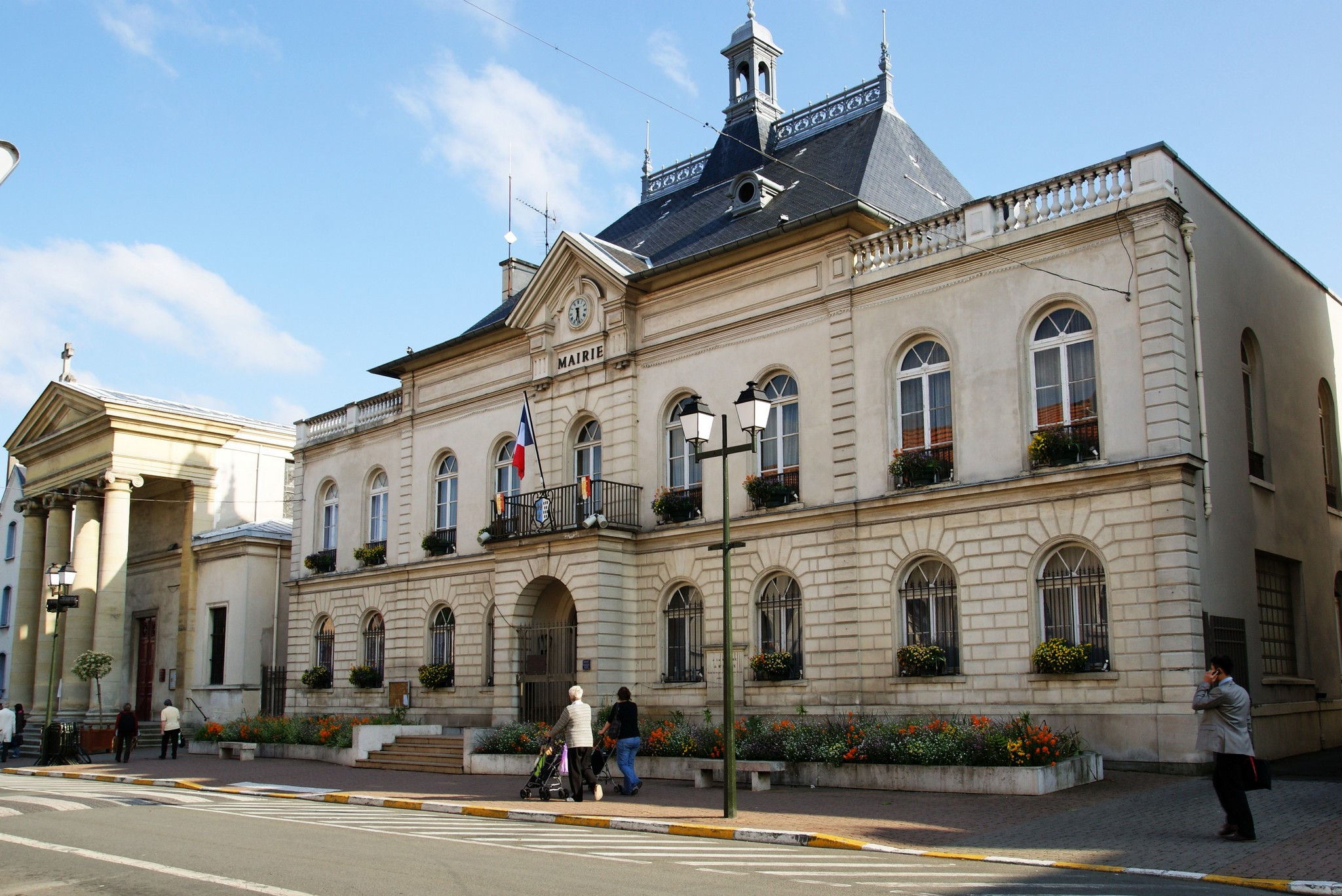 Splendide mairie de Bourg La Reine , à côté, se trouve l'église Saint Gilles.